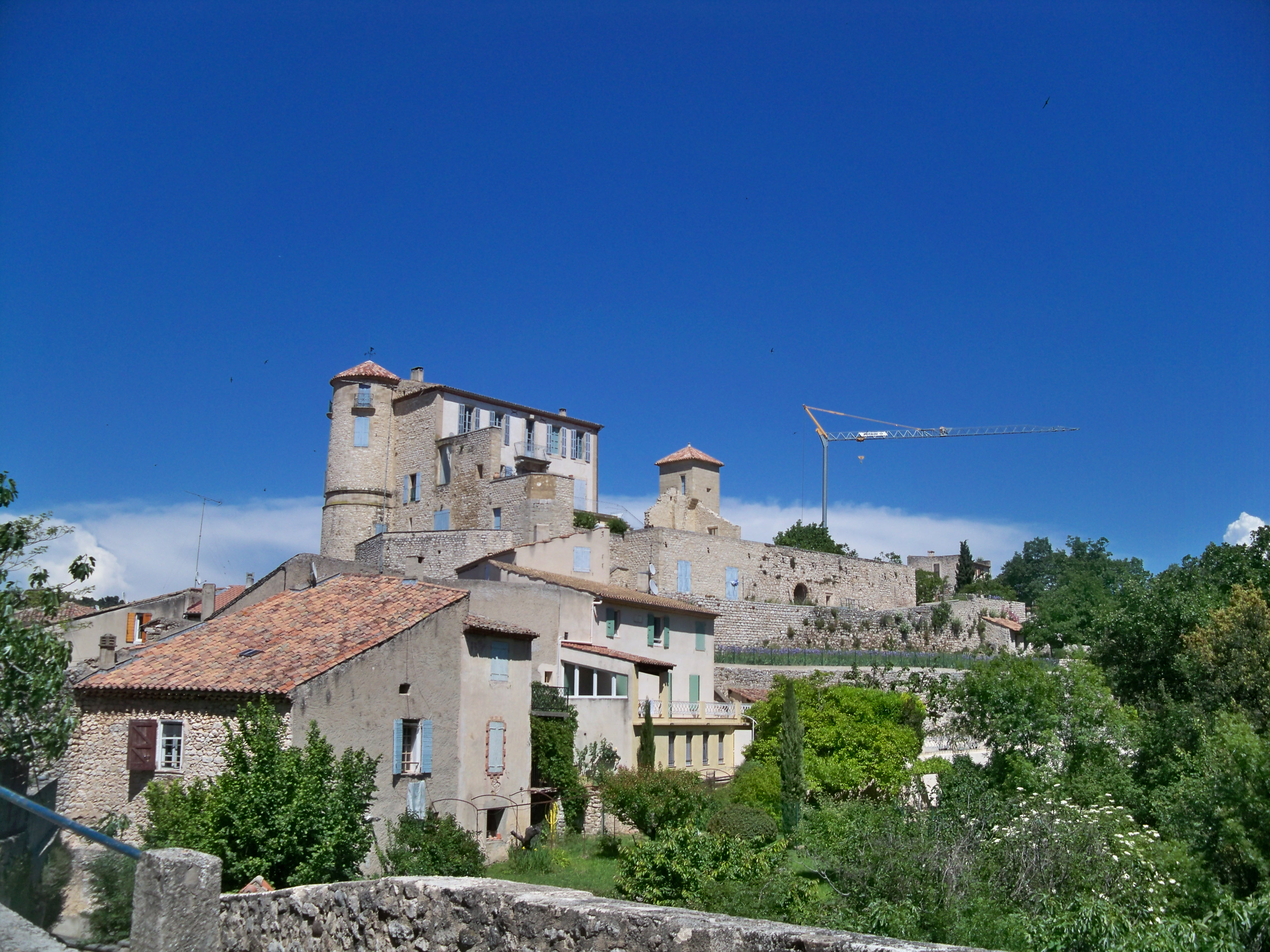 La Bastide-des-Jourdans